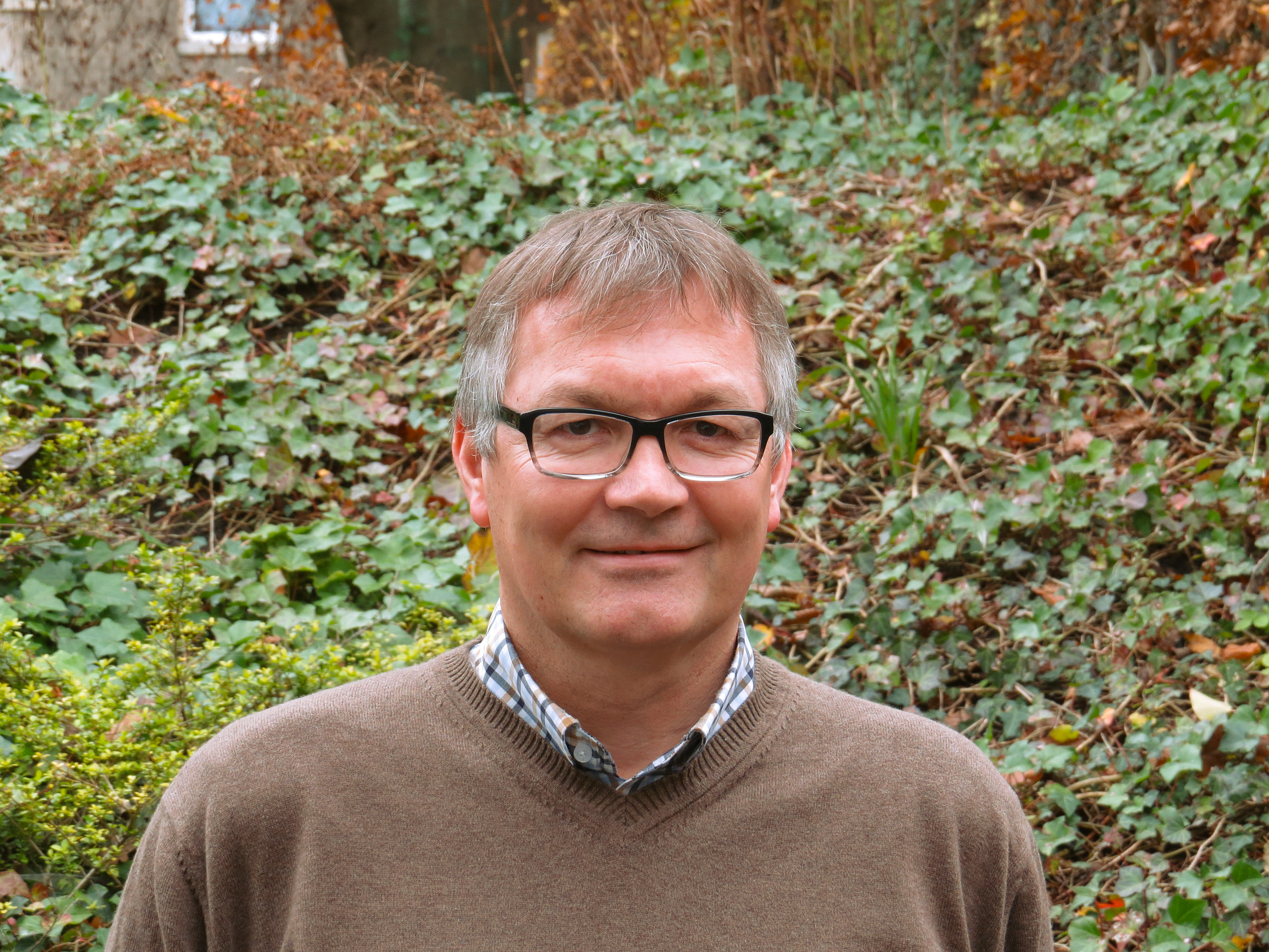 Geschäftsführer Eberhad Veith